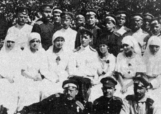 Солдаты белого Дроздовского полка и медсёстры в харьковском госпитале. 1919 год. Лето или ранняя осень. Предположительно Технологический сад (техноложка).